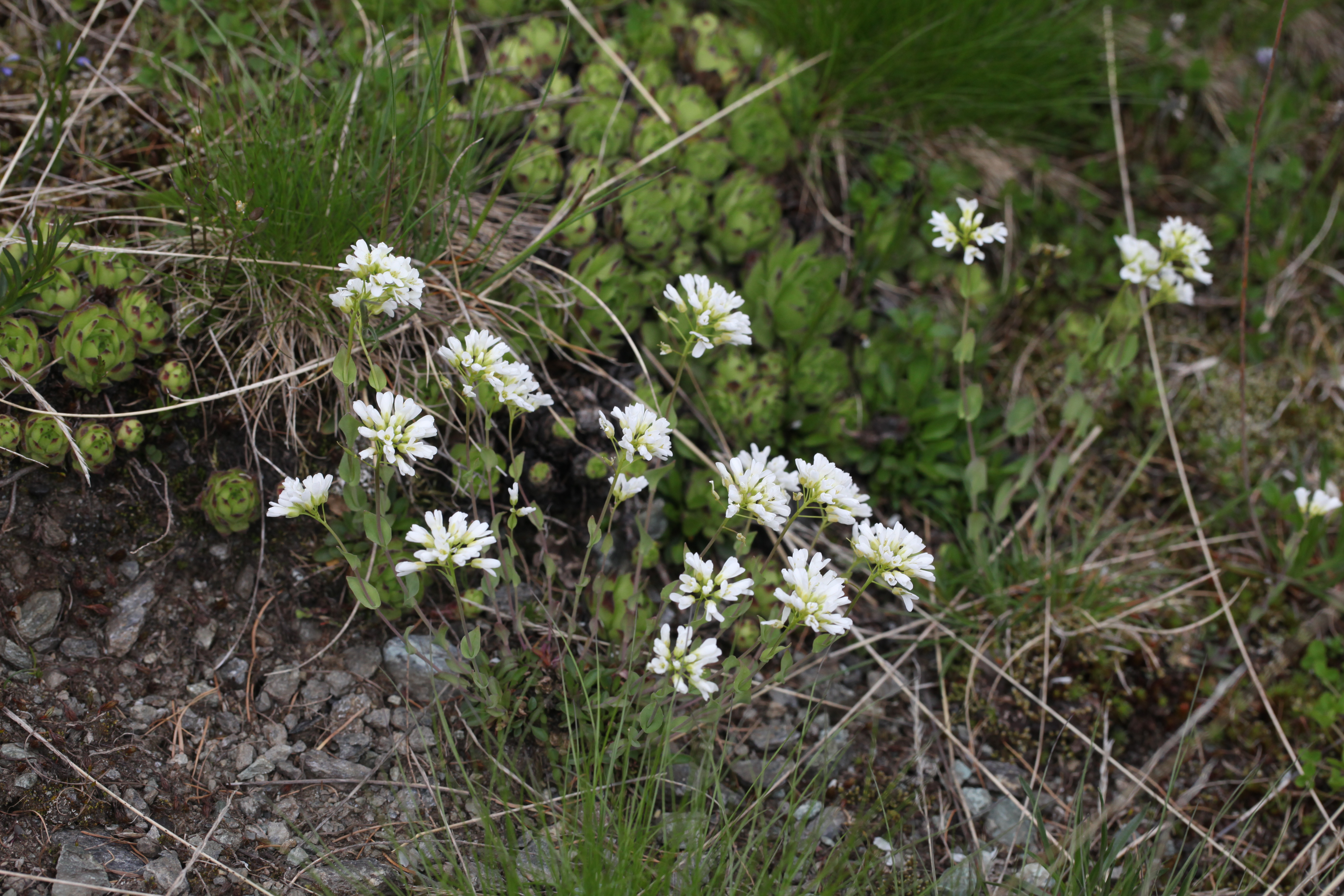 Tabouret des Alpes dans la RNN de Ristolas - Mont Viso.